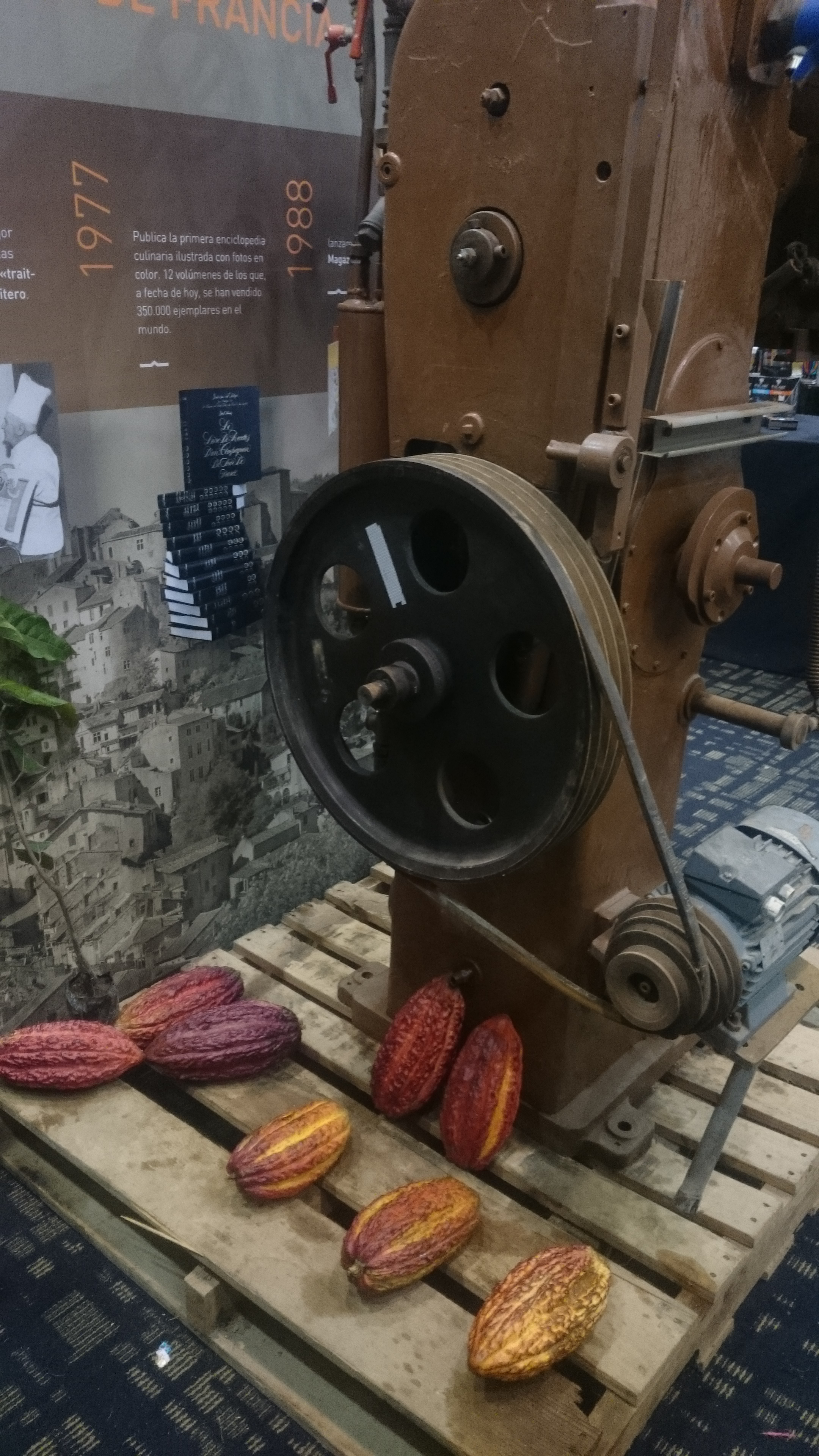 Imagen de la Feria Raíces 2018